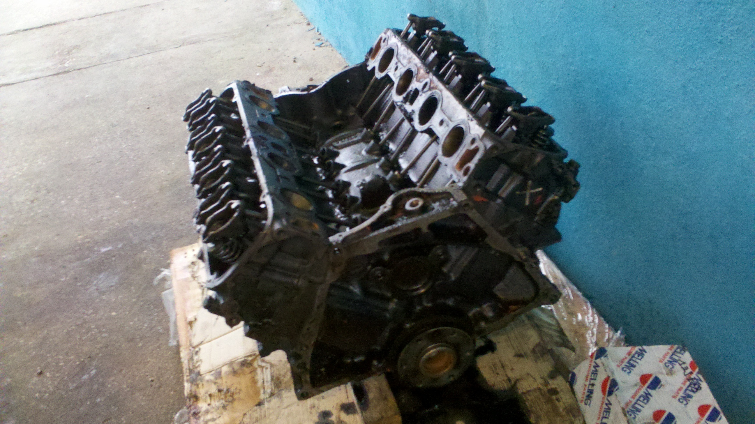 Un motore 7700 cc 8 cilindri a V realizzato in Italia e utilizzato per scopi industriali